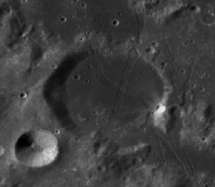 Cráter lunar Palmieri. (Imagen LRO)